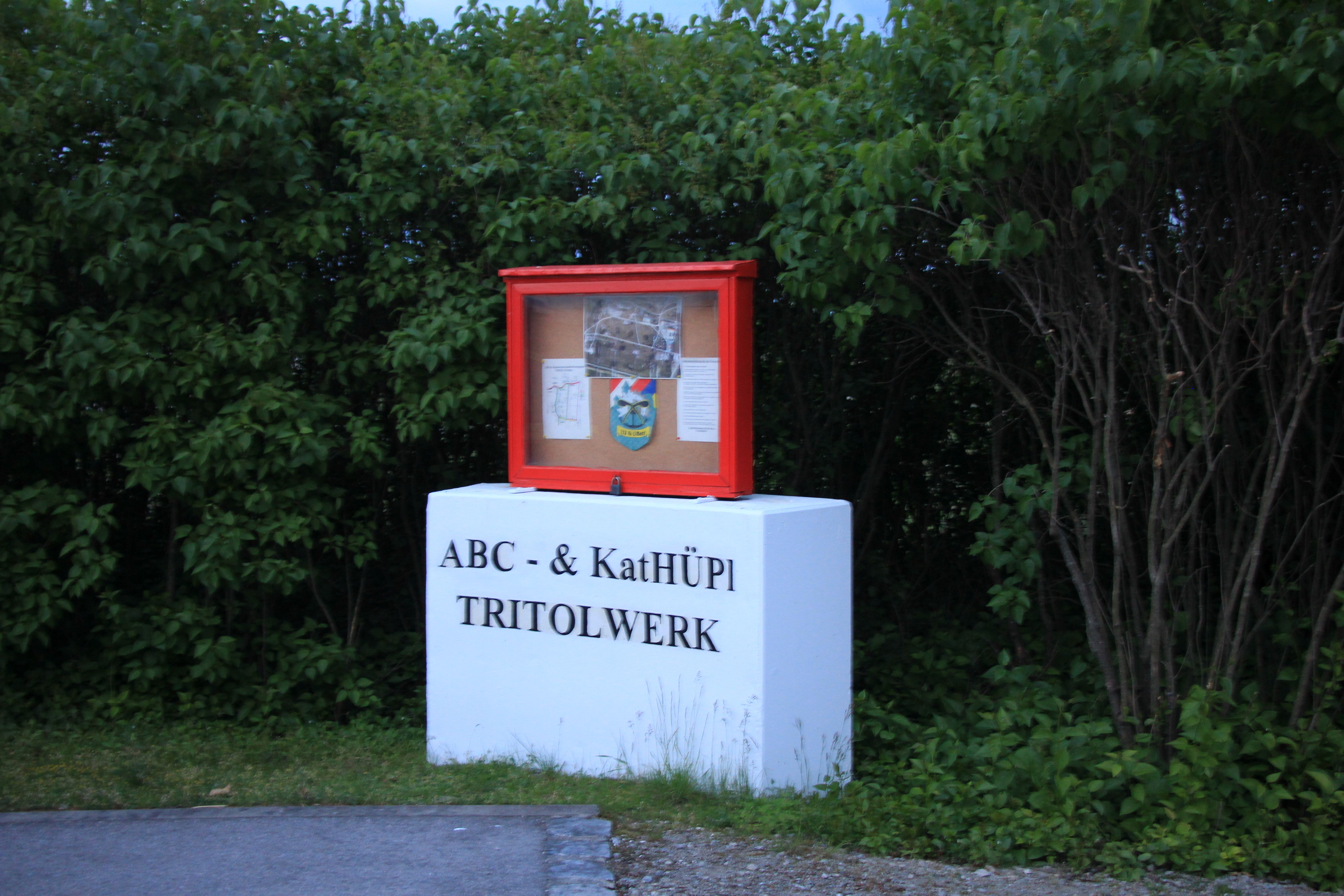 Kathüpl des Bundesheer im Tritolwerk